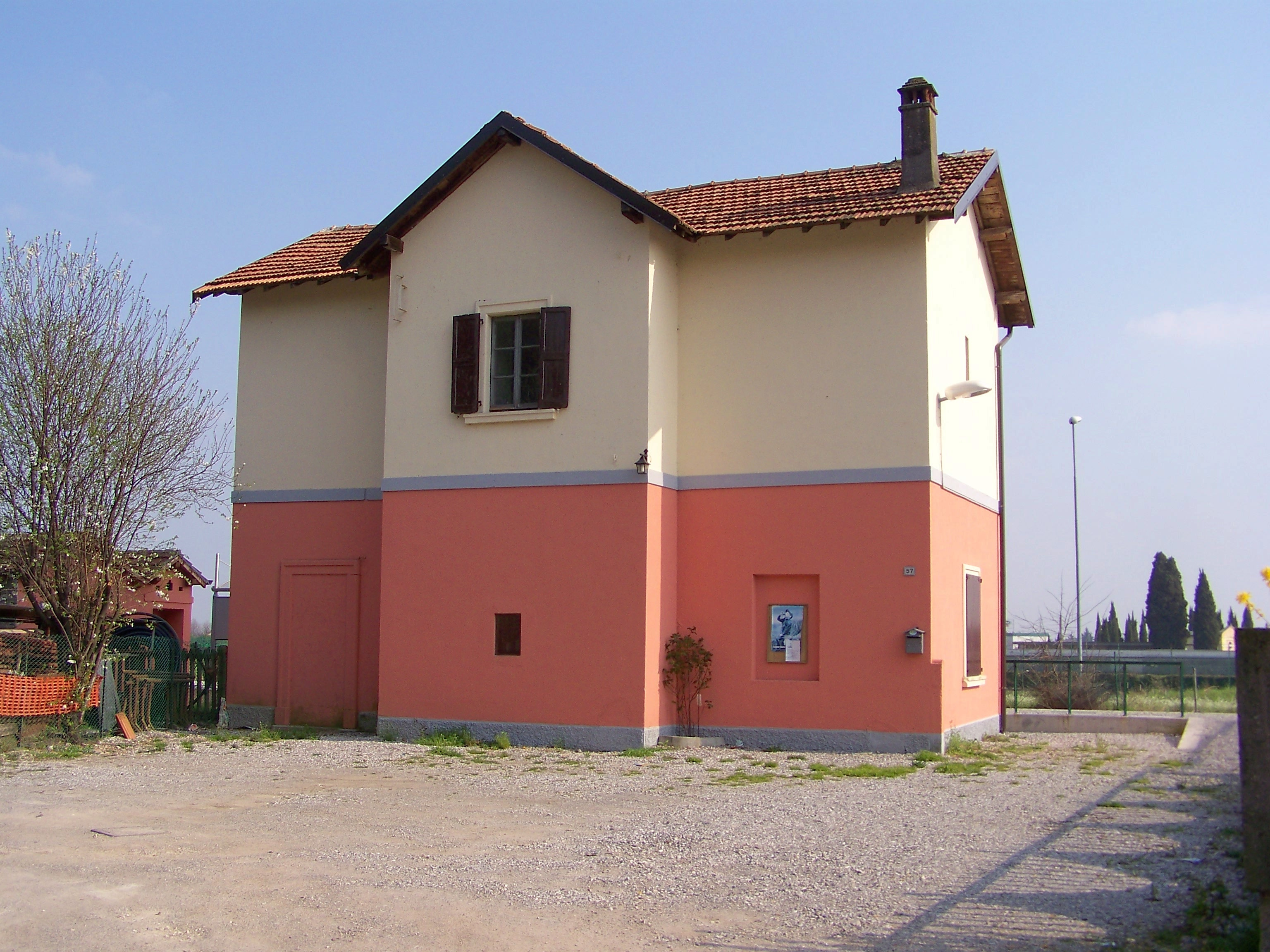 Lato campagna della stazione di Cazzago nel 2011